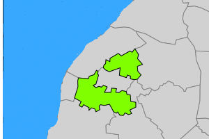 Overzichtskaartje ligging voormalige gemeente Franekeradeel (1956).